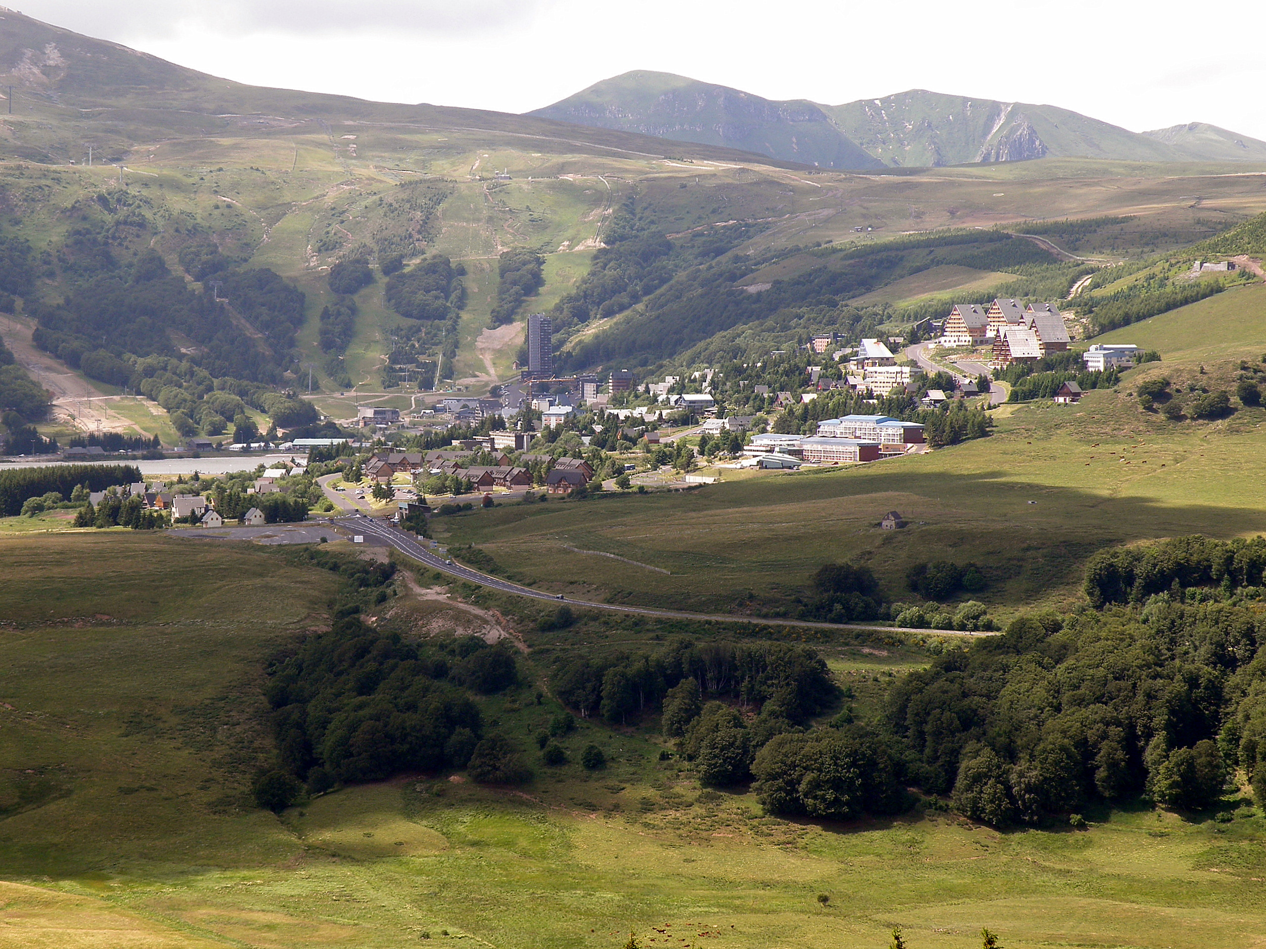 Besse-et-Saint-Anastaise, commune du Puy-de-Dôme (France, région Auvergne). La station de ski et village de vacances de Super-Besse, vu depuis le puy de Montchal. On distingue le lac des Hermines (à gauche) et la tour à étages dite tour de la Biche (au centre). Au fond : massif du Sancy. Plus près de nous : route départementale 149. Regard porté vers le nord-ouest.